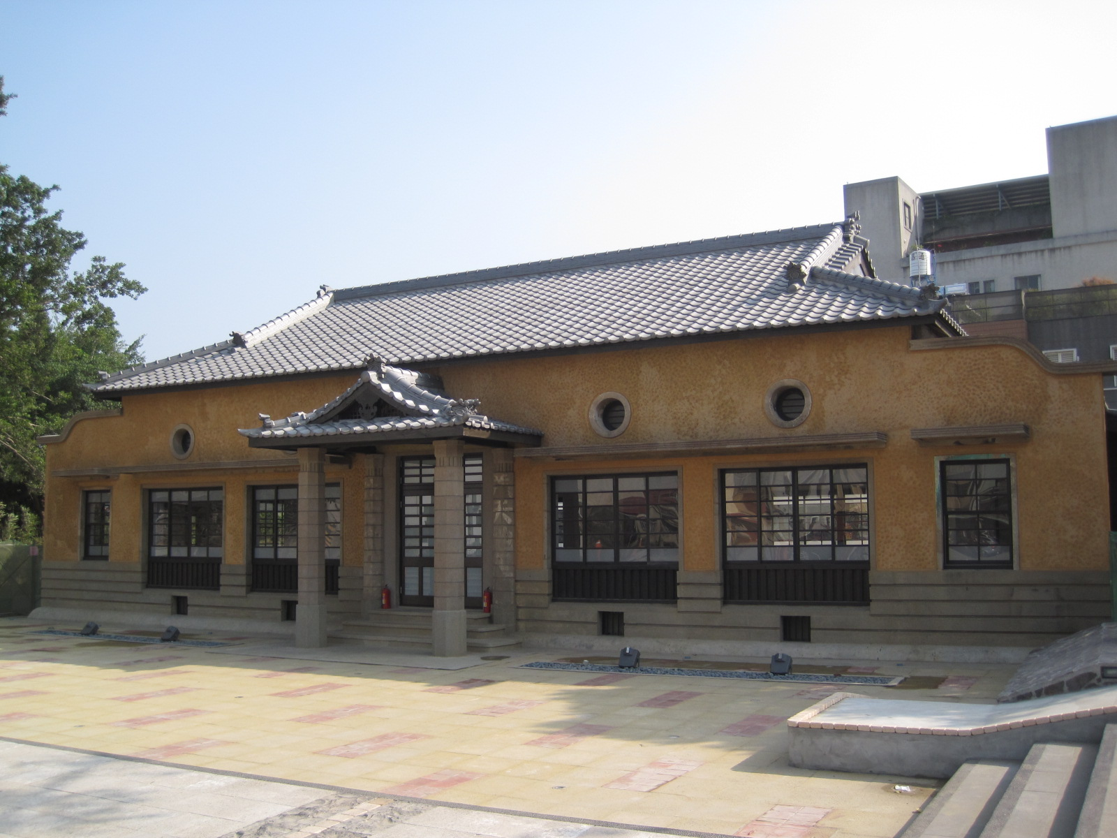 中文（台灣）: 臺灣臺南市新化武德殿整修後的樣貌